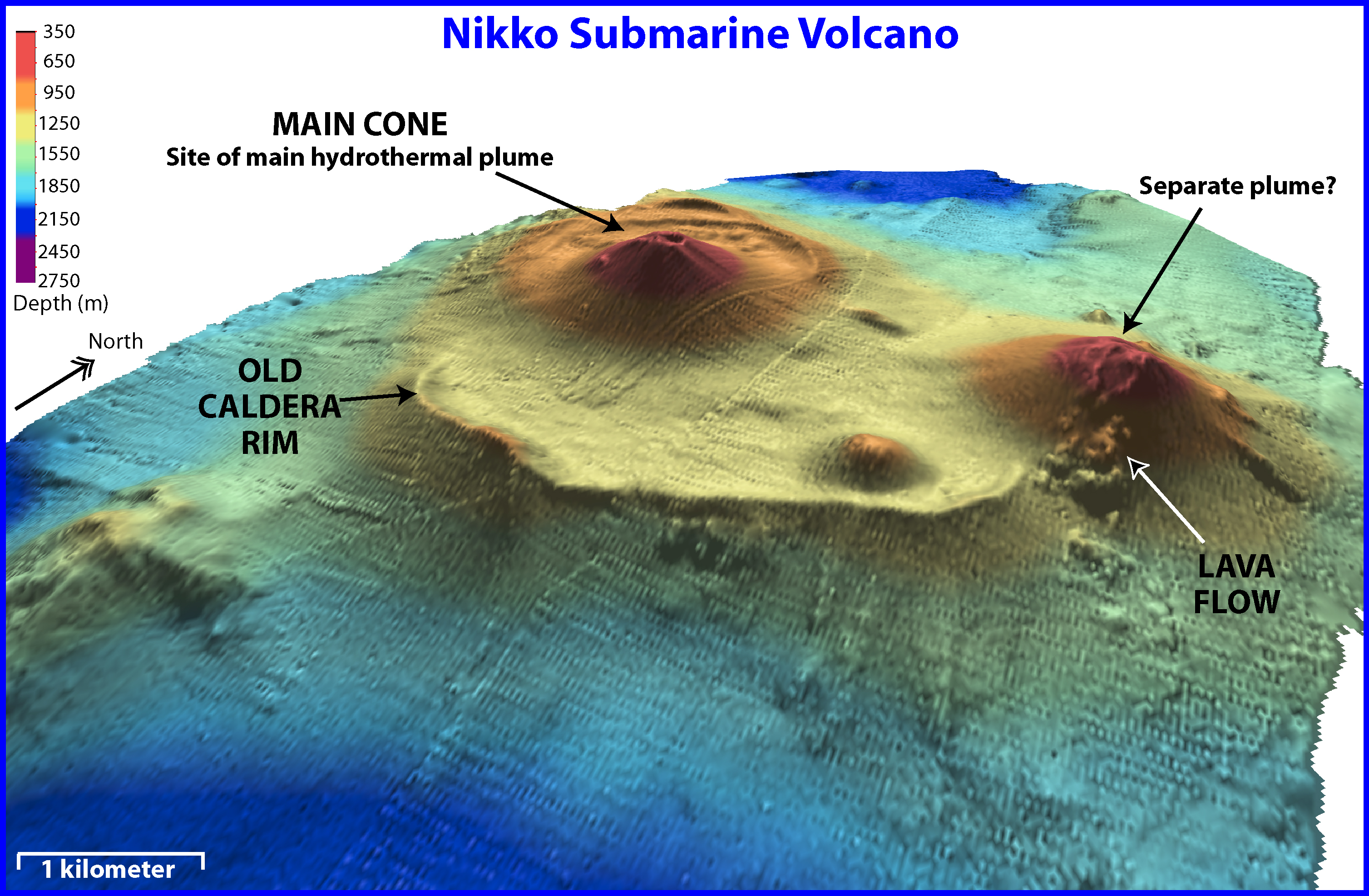 Nikko volcano.